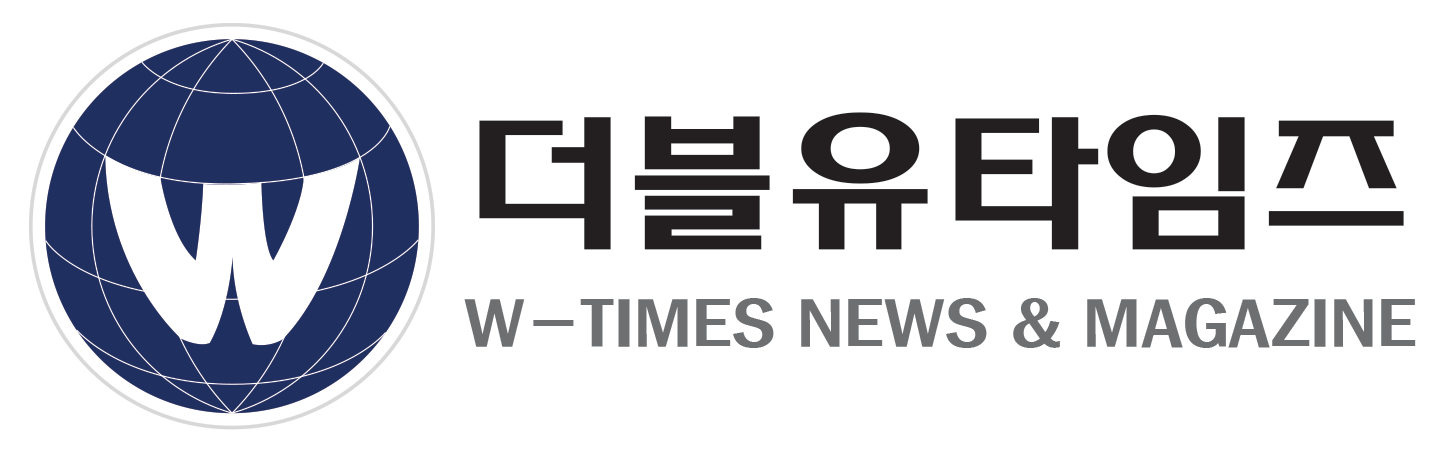 더블유타임즈